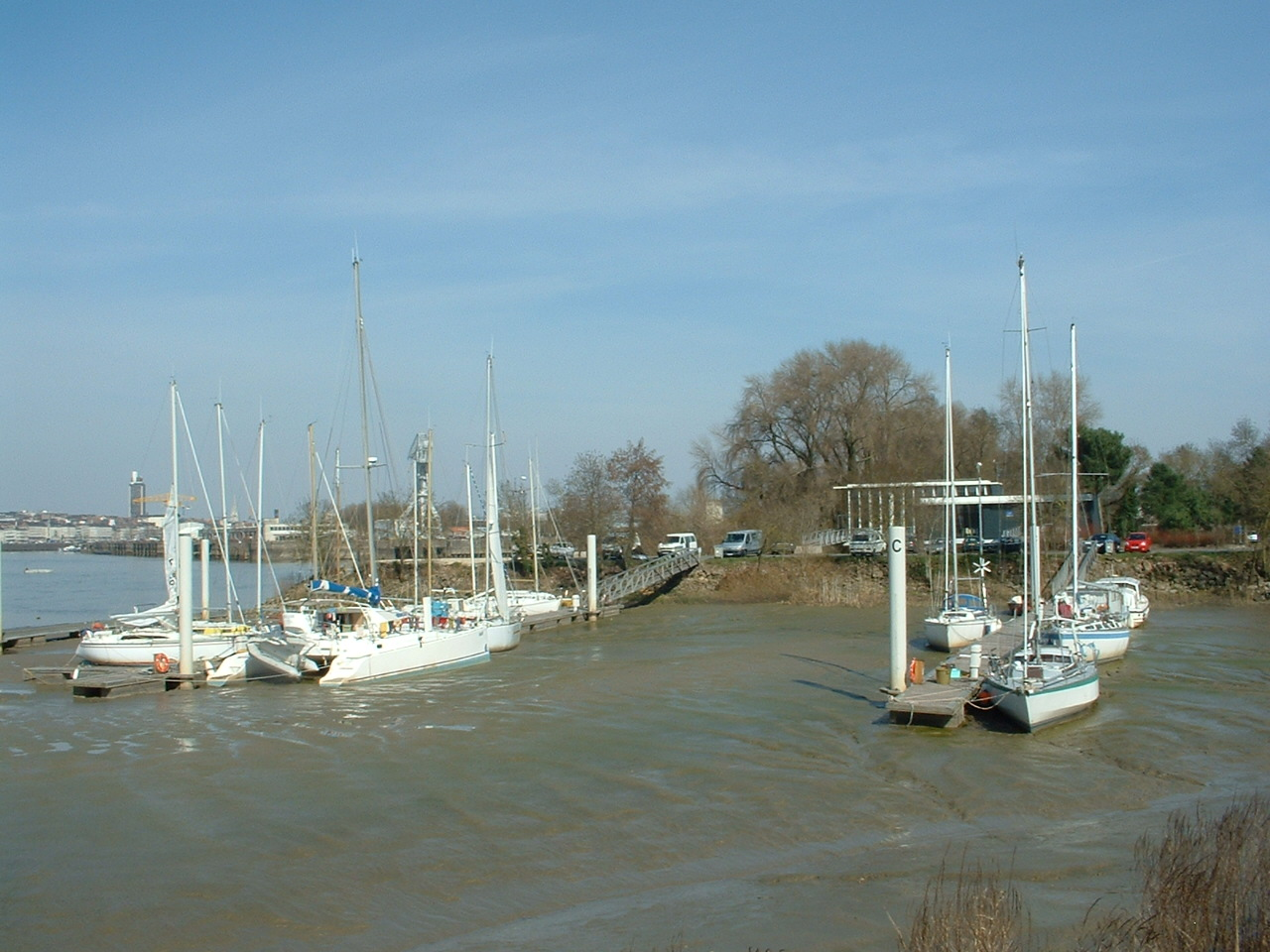 Rezé (France) Port de Trentemoult sur la Loire à marée basse